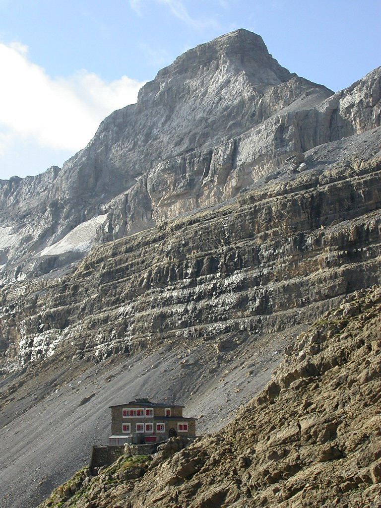 Refuge des Sarradets et Casque du Marboré en fond, photo prise depuis le Col des sarradets.